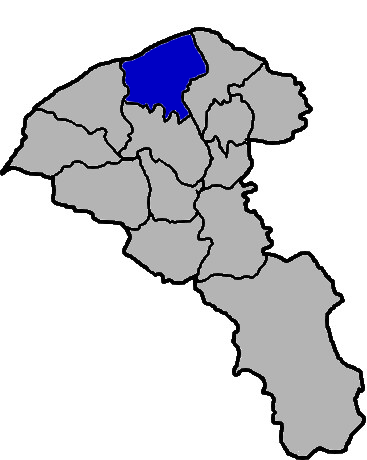 KaurJmeb為編輯中華民國臺灣省桃園縣大園鄉，於2005年2月7日所繪。